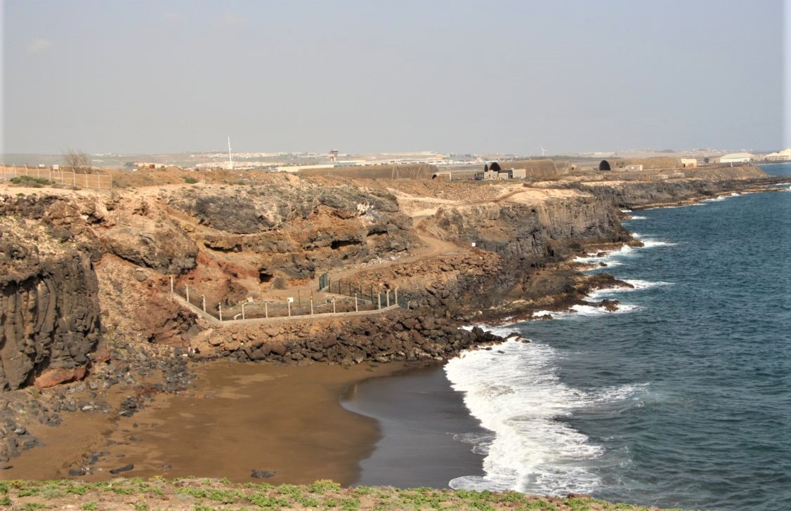 Playa de San Agustín, escondida tras la montaña de Vista Alegre (El Burrero)